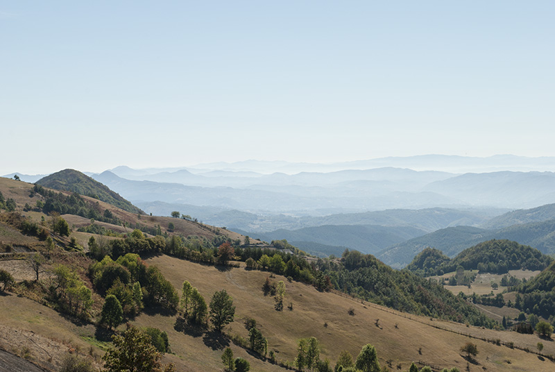 Snimljeno sa puta Valjevo- Donji Taor